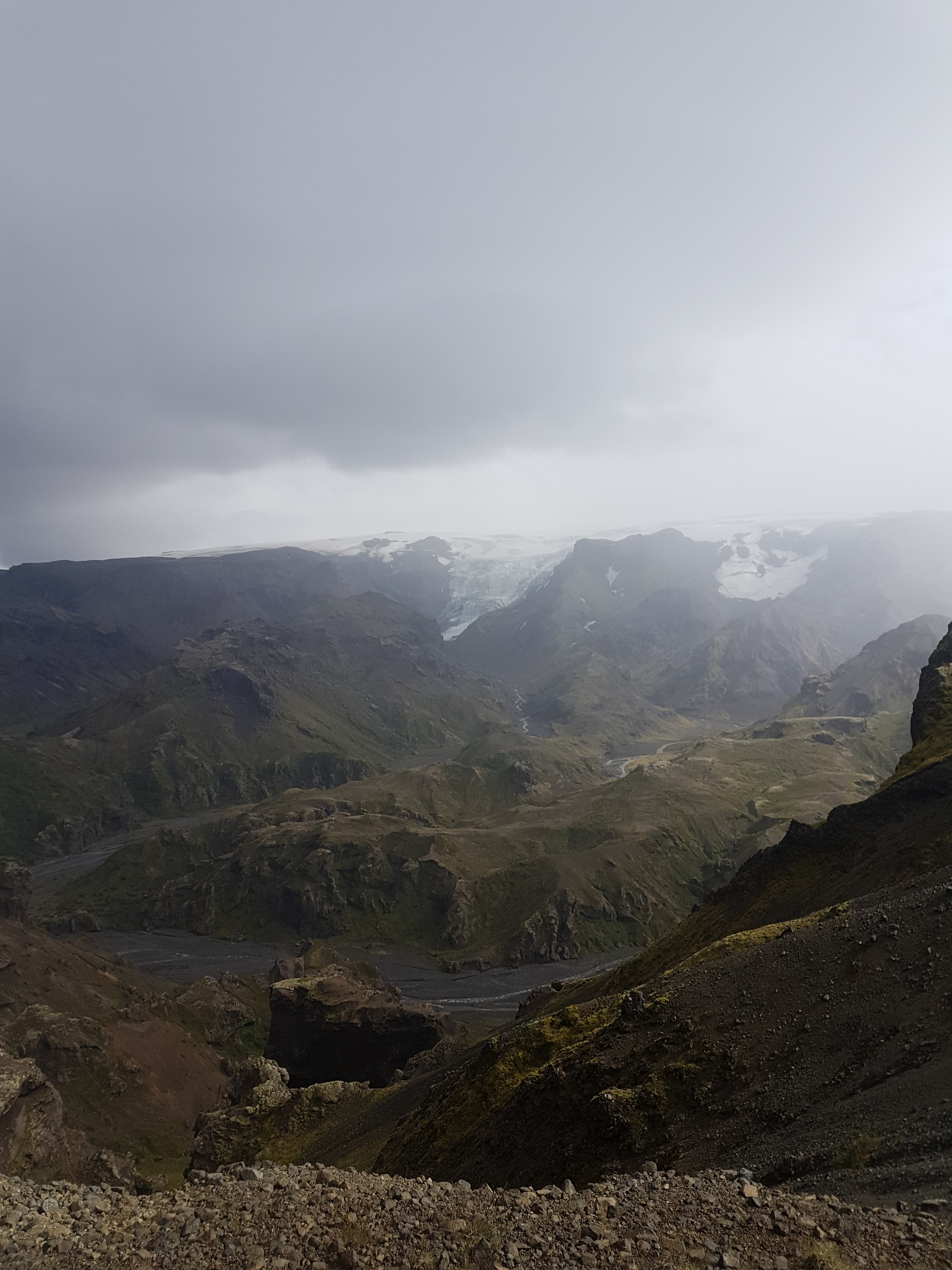 Mýrdalsjökull í bakgrunni, Teigs, Guðrúnar og Múlatungur.